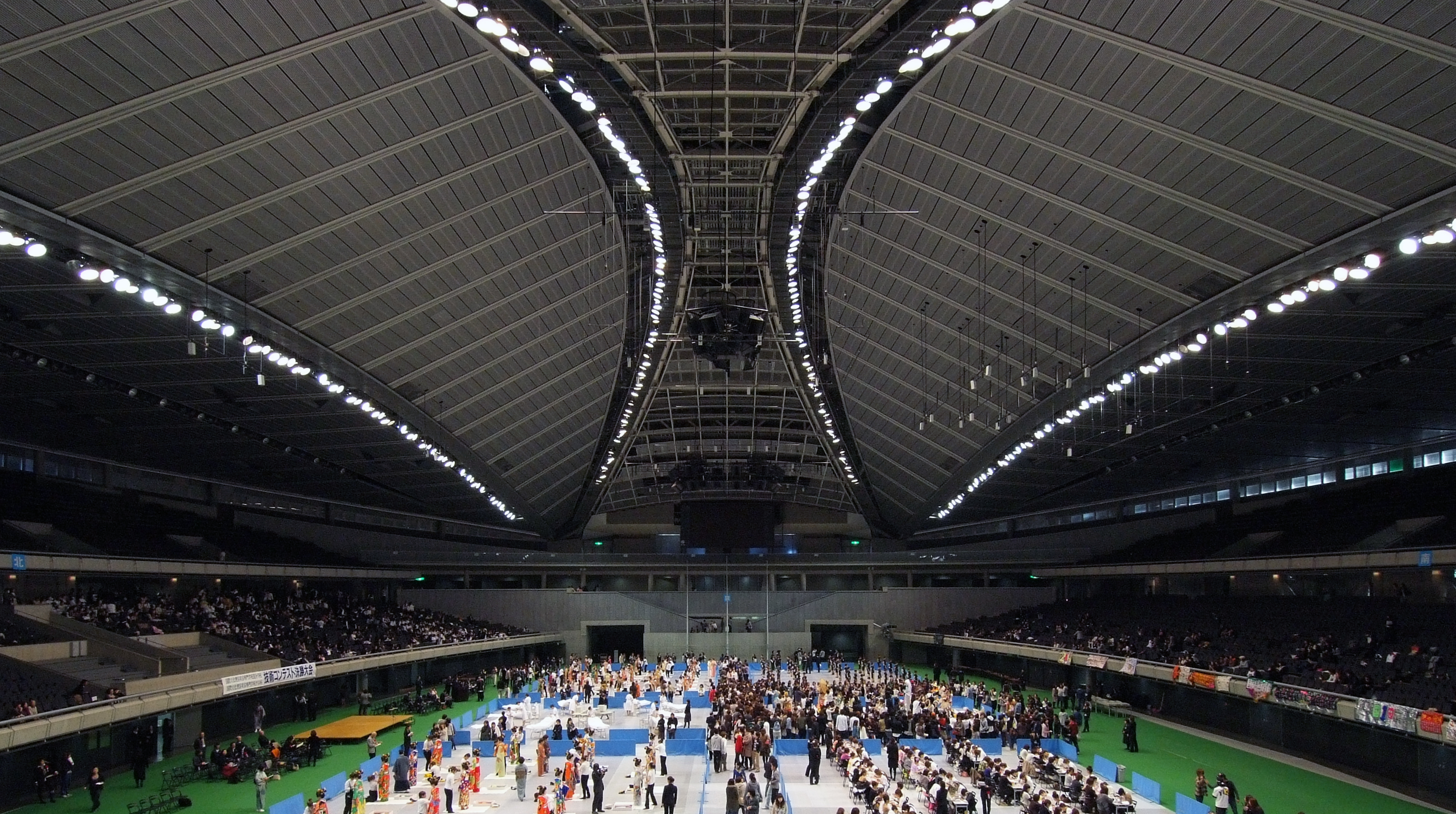 Interior of Tokyo Metropolitan Gymnasium, at Sendagaya Tokyo Japan, design by Fumihiko Maki in 1990.